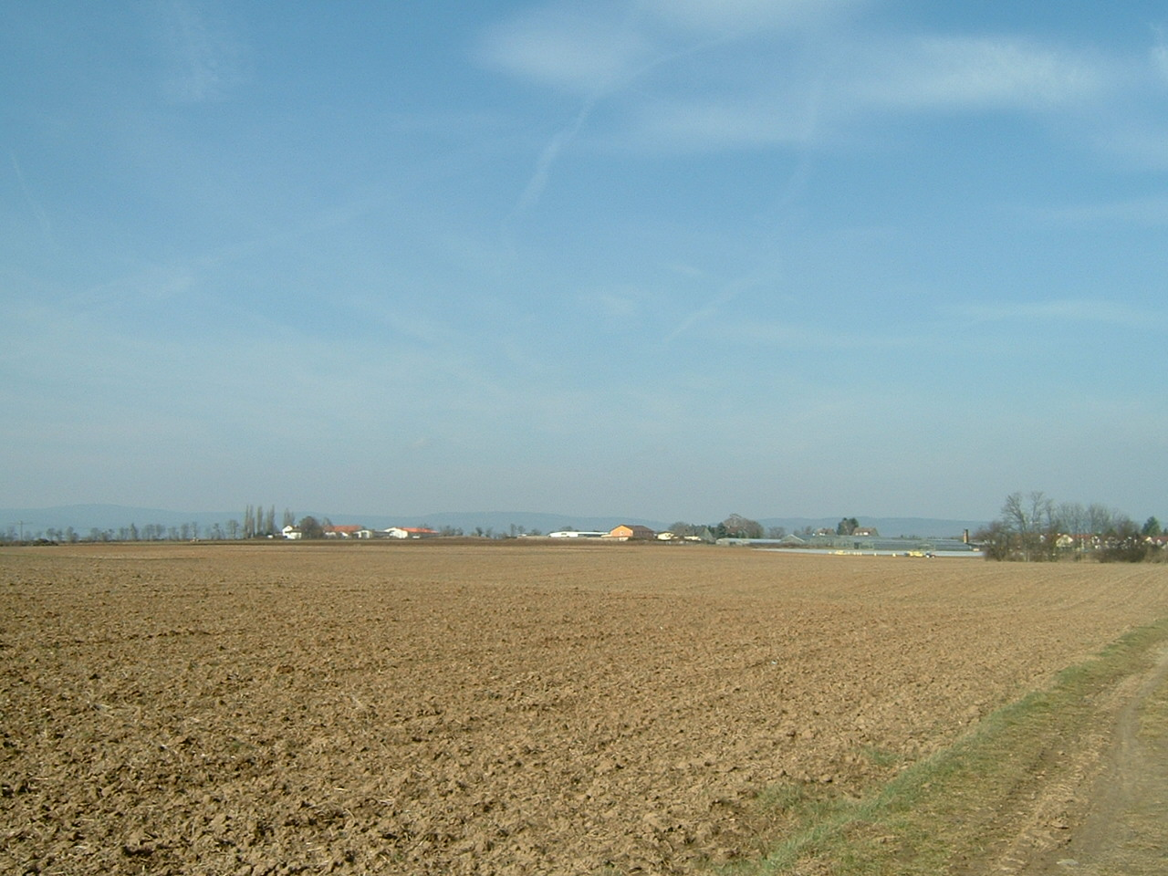 Blick vom Massenheimer Feld nach Frankfurt-Nieder-Erlenbach